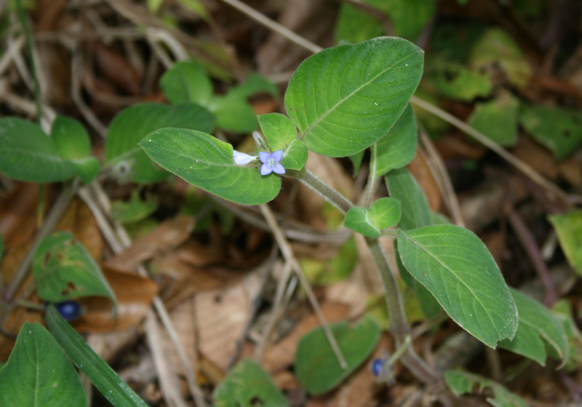 Coccocypselum hirsutum, Kaffeegewächse (Rubiaceae) - Costa Rica: Prov. Puntarenas, La Gamba NW Golfito, "Fila Trail" NW "Tropenstation La Gamba"/"Estación Biológica La Gamba"